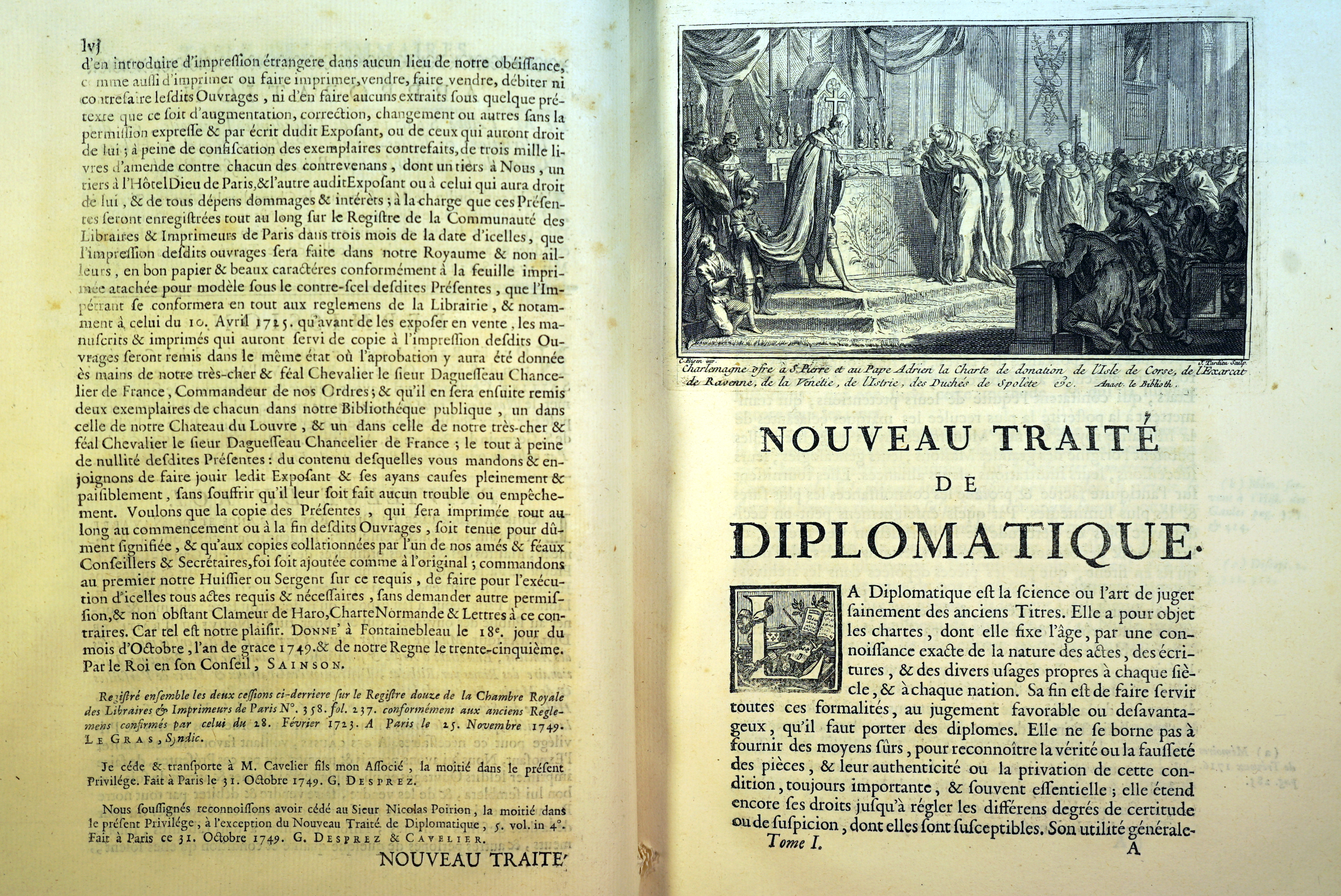 publié dans "nouveau traité de diplomatique...".